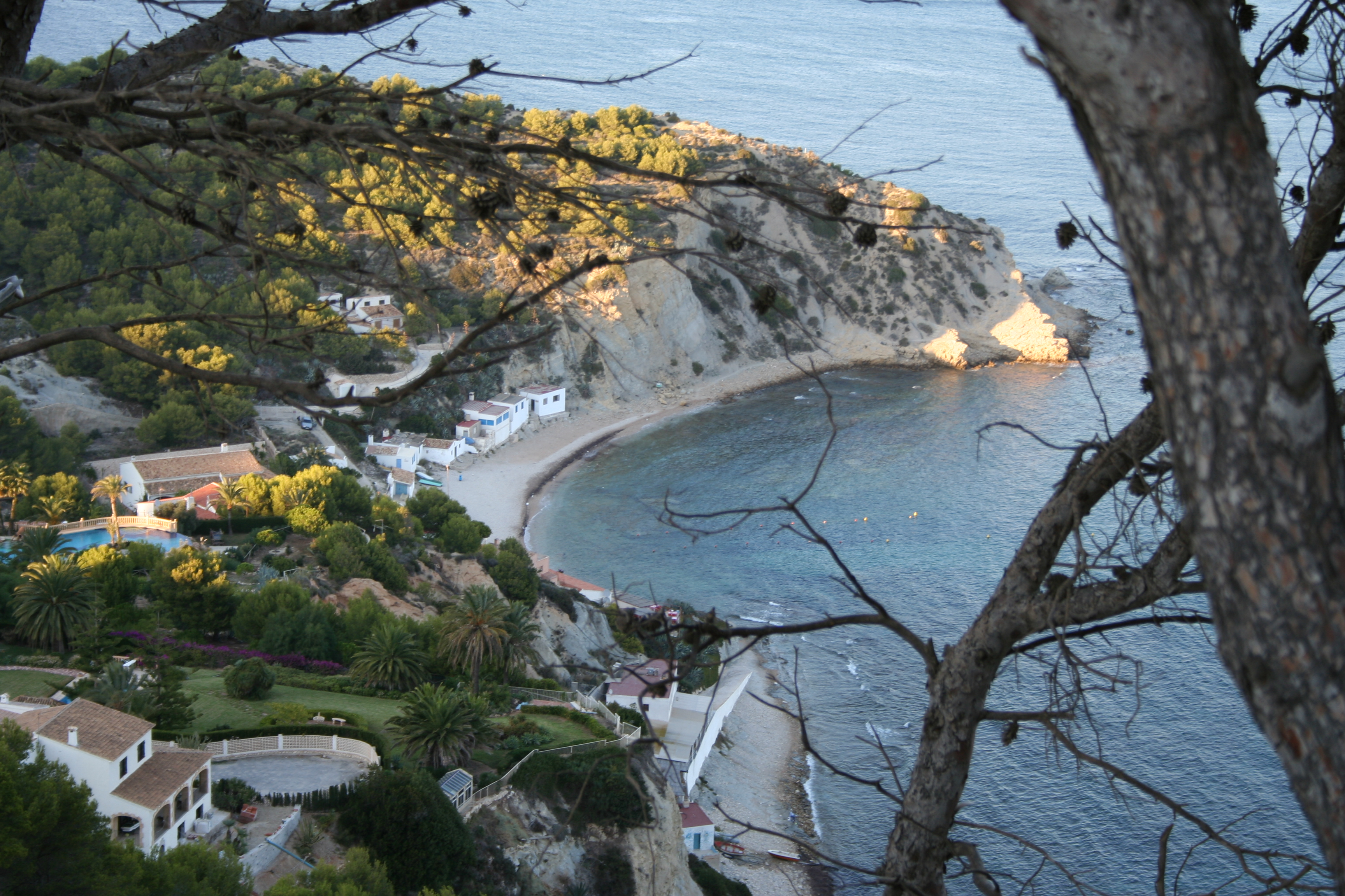 Pido al autor de este esplendido artícilo sobre Jábea que rotule adecuadamente esta fotografía, yo no se exactamente el nombre de esta playa. Yo, el autor de la fotografía, tampoco se exactamente como se llama esta playa, podria tratarse de la playa de la Barraca pero no estoy seguro, si alguien de la zona lo puede confirmar, estupendo.